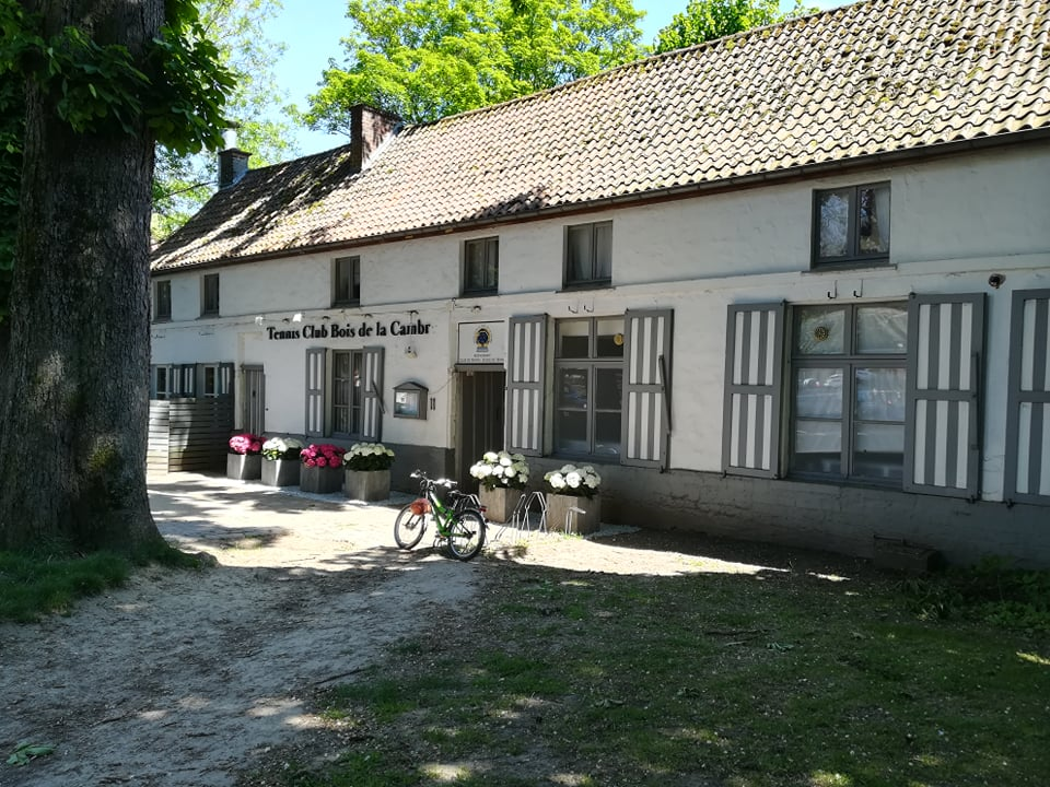 l'emplacement de l’ancienne maison ferme du Vieux Tilleul